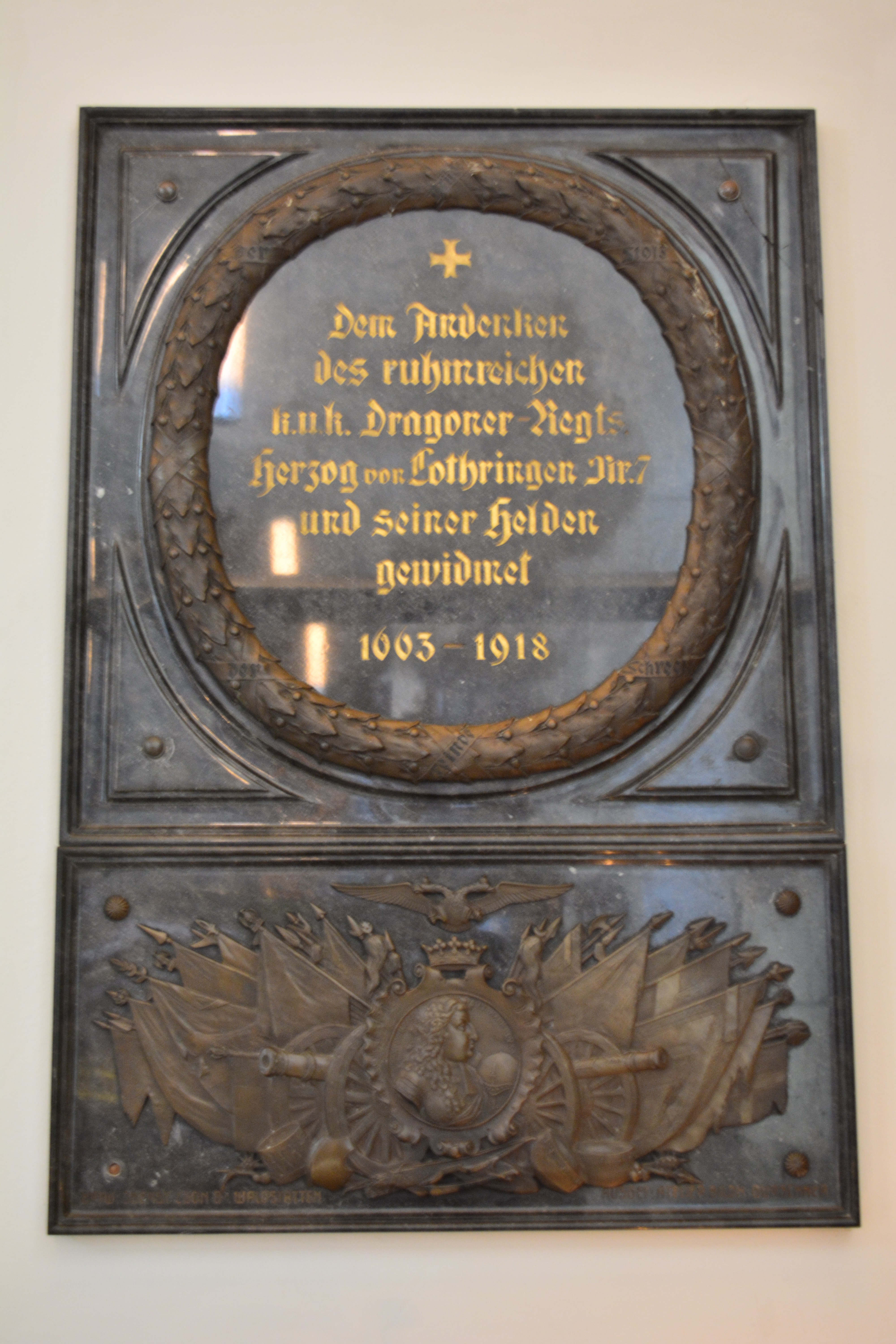 Gedenktafel für das k.u.k. Dragonerregiment Nr. 7 (Wien, Neuer Markt, Kapuzinerkirche)